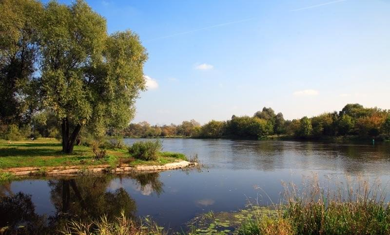 Polska